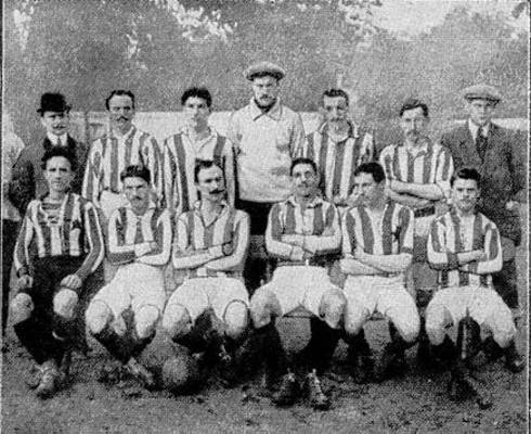 L'équipe de football du Red Star en 1910. Debout : Perrin, Lucien Gamblin, Woolley, Alfred Gindrat, Nicolaï. Accroupis : De Salengee, G. Denis, Julien Du Rhéart, Eugène Maës, Schmid, J. Verbrugge